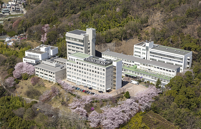 2015 Osaka Aoyama